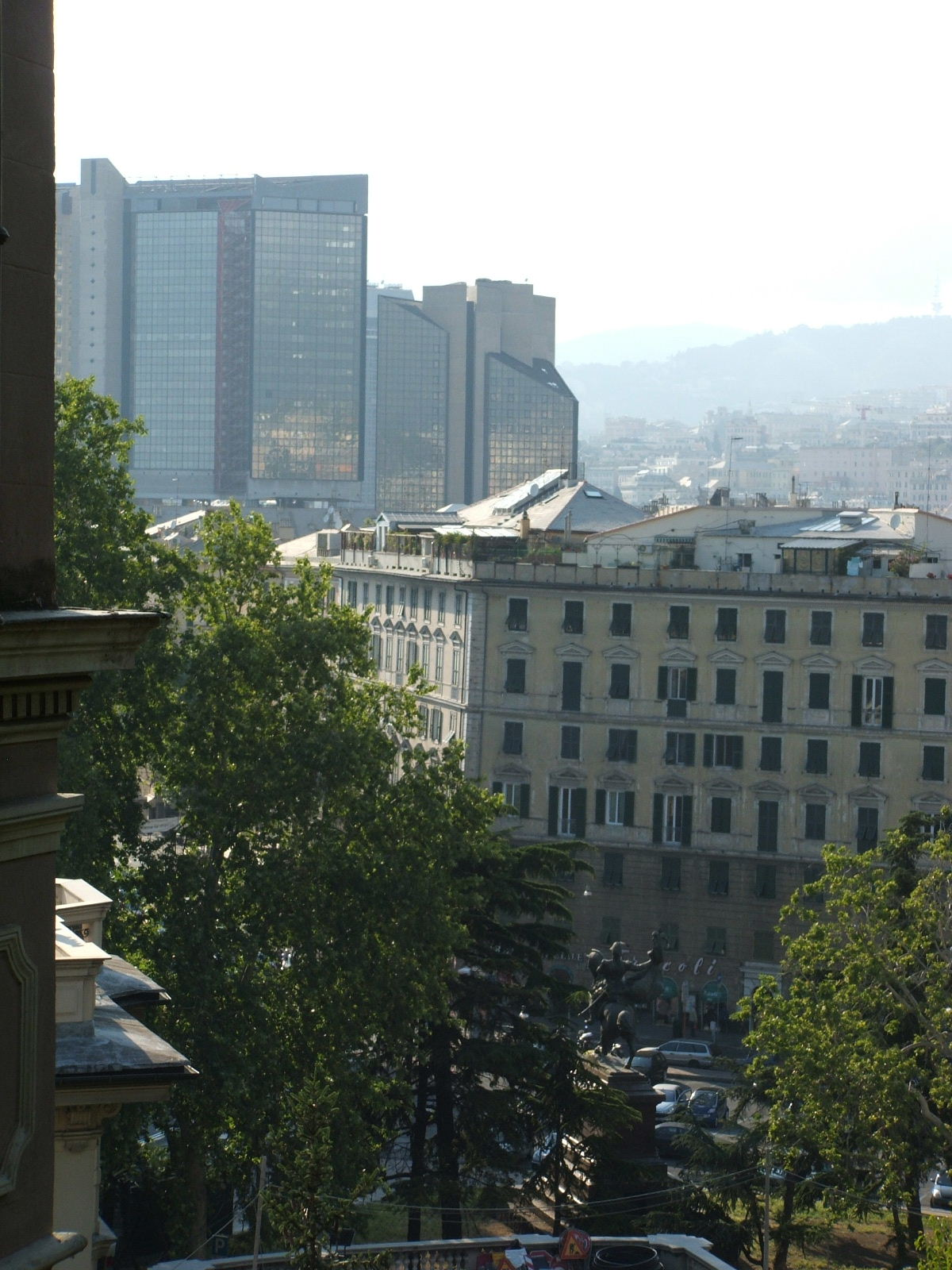 Genova, quartiere di Albaro